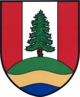 Nové Heřminovy, znak. V červeném štítě se stříbrným kůlem vyrůstá ze zeleno-zlato-modře vlnitě děleného návrší modřín přirozené barvy.